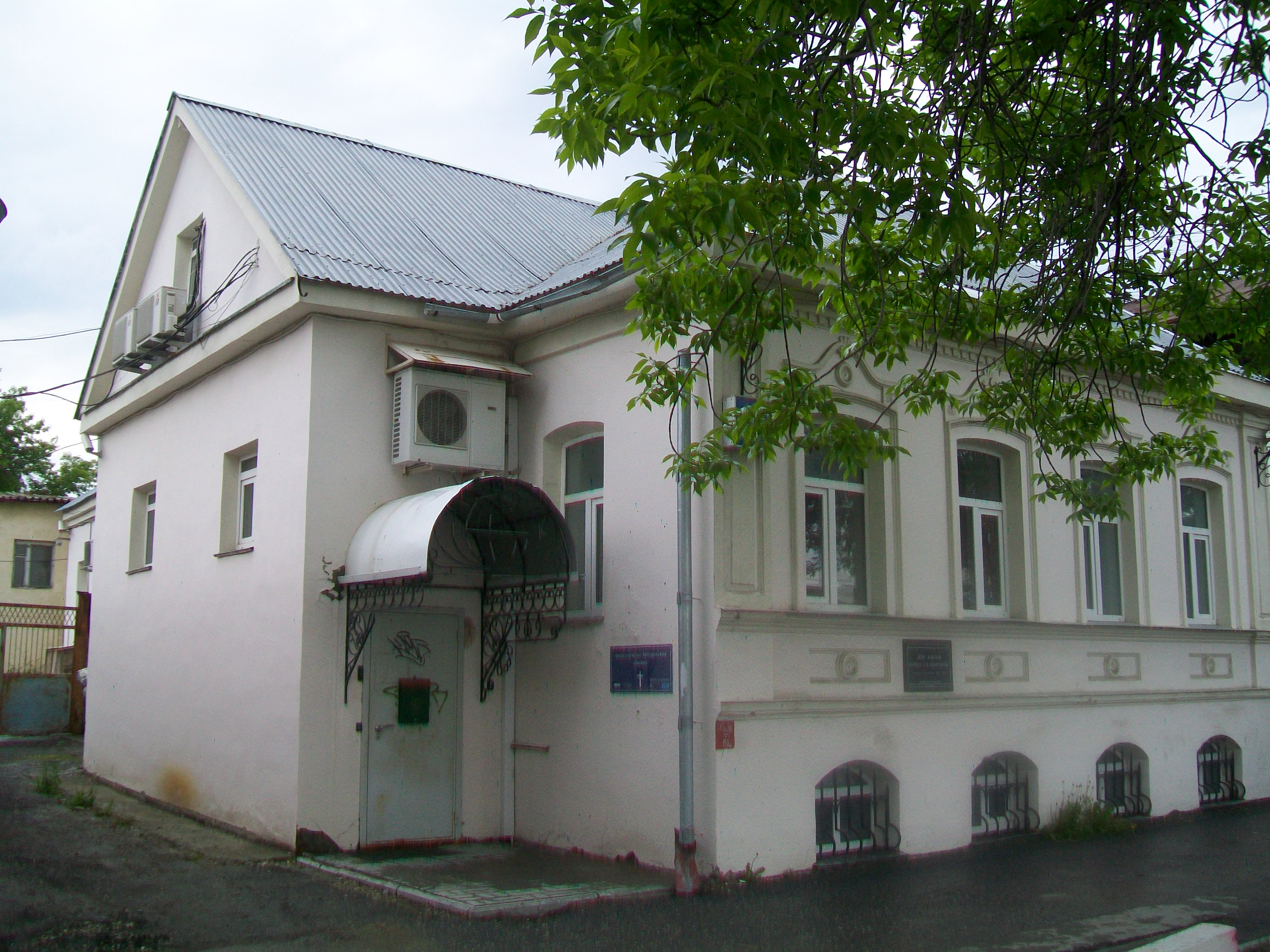 Здание Евангелическо-лютеранской общины в Екатеринбурге (июнь 2017 года) Добролюбова, 8 в